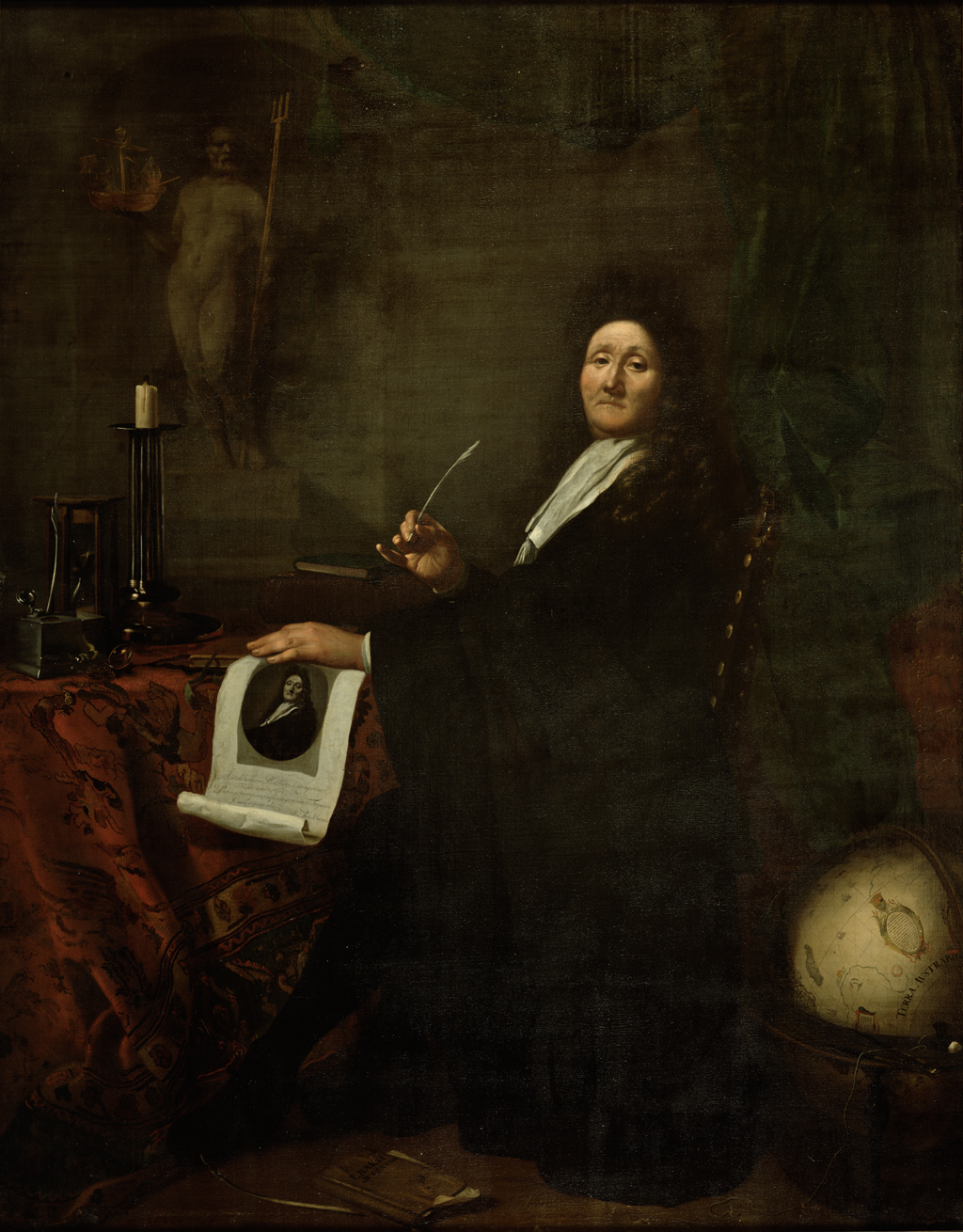 schilderij; portret; zelfportret; prent; beeld; inktpot; vanitas; Bakhuizen, Ludolf